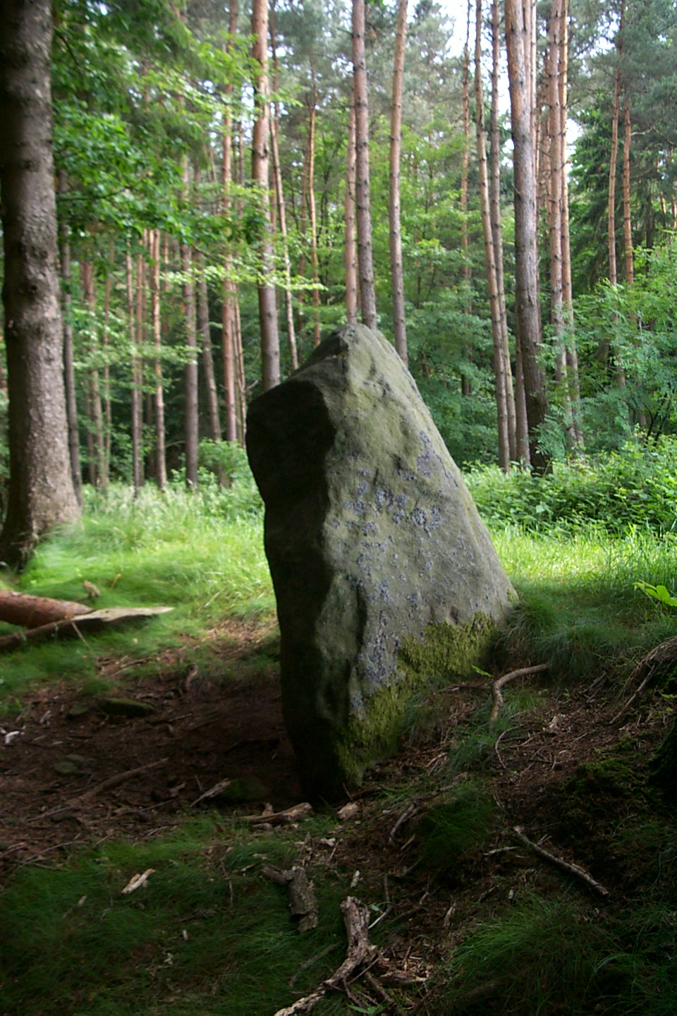 Der Menhir Langenstein auf dem Ferschweiler Plateau auf dem Gemeindegebiet von Holsthum.